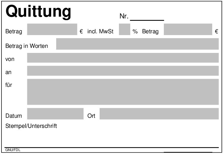 Beispiel für ein Quittungsformular; Erstellt mit 2.2.1